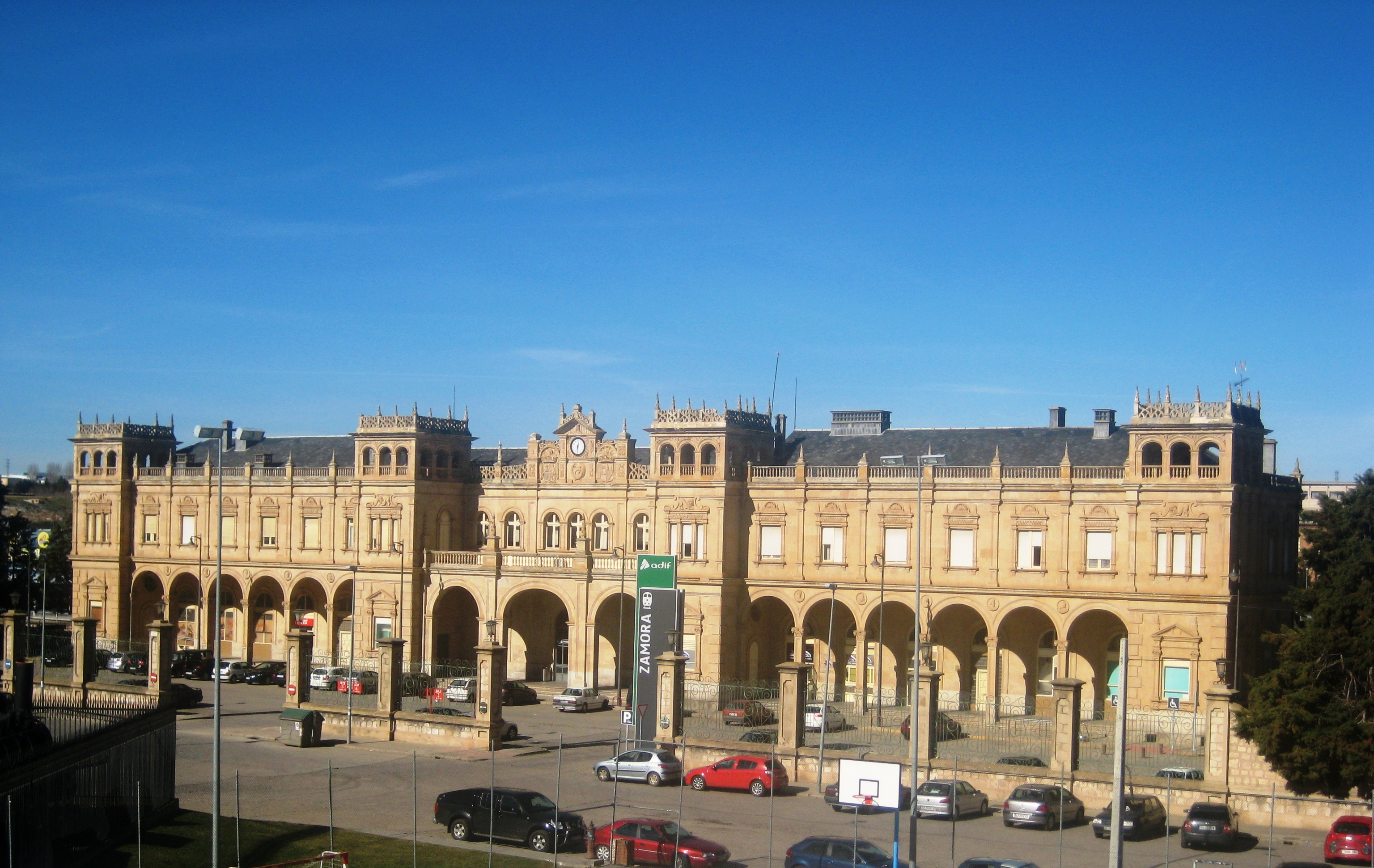 Estación de ferrocarril de Zamora, de estilo neoplateresco.